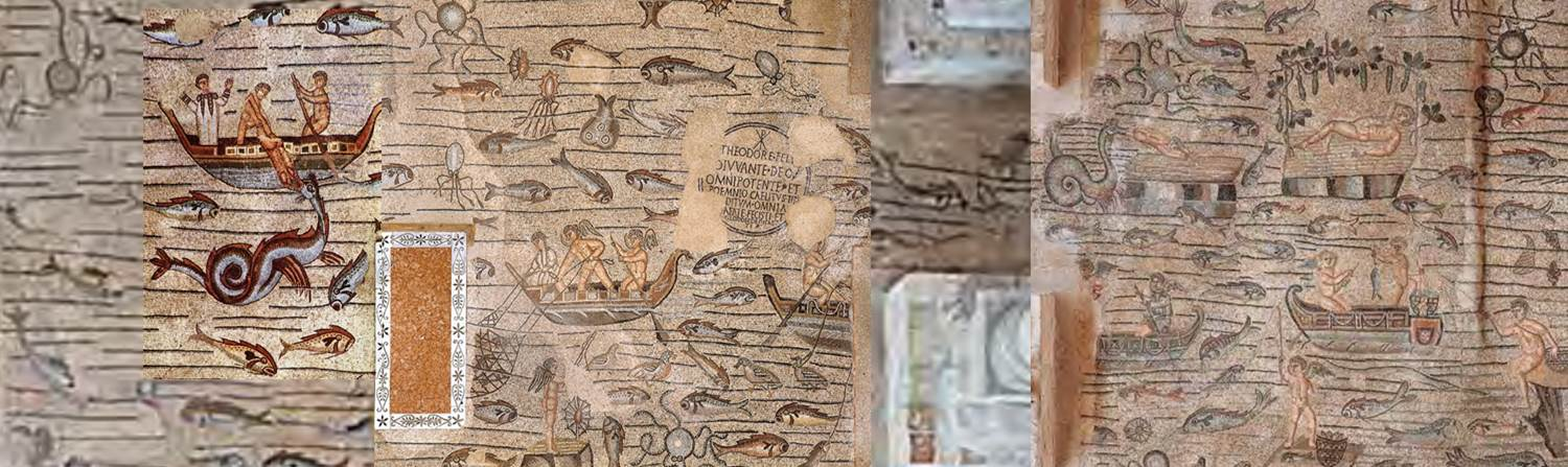 The biblical story of Jonas in the mozaik of Aquileia, Theodorian South Hall.